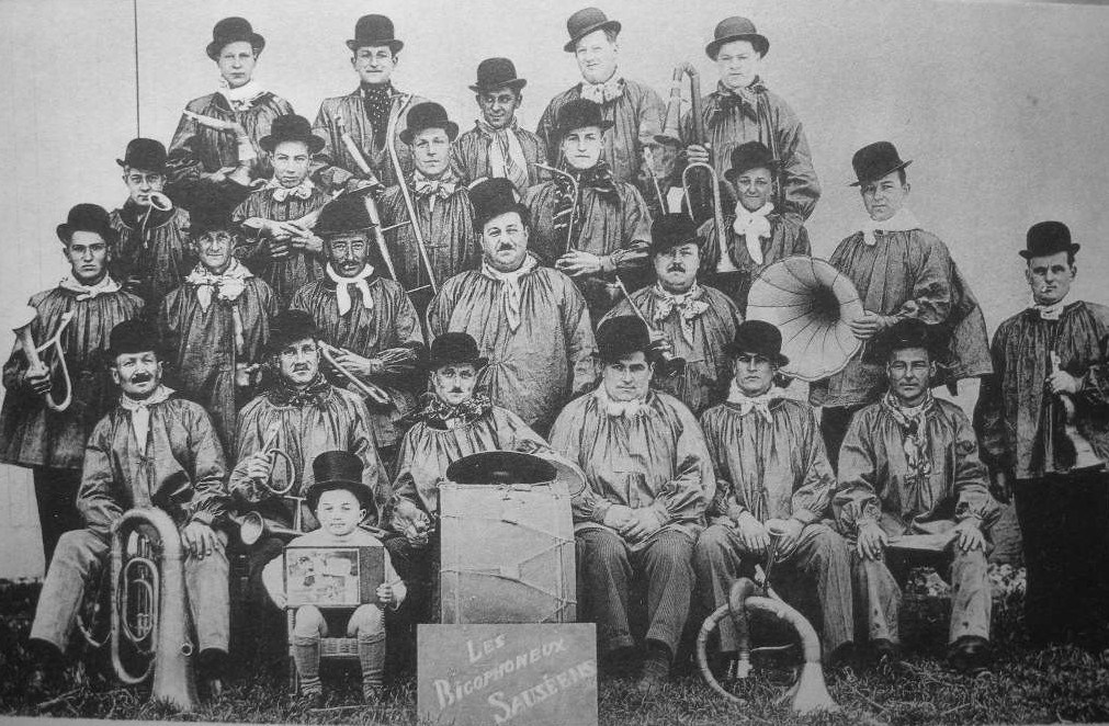 Les Bigophoneux Sauséens membres de l'Amicale bouliste de Sauzé-Vaussais.